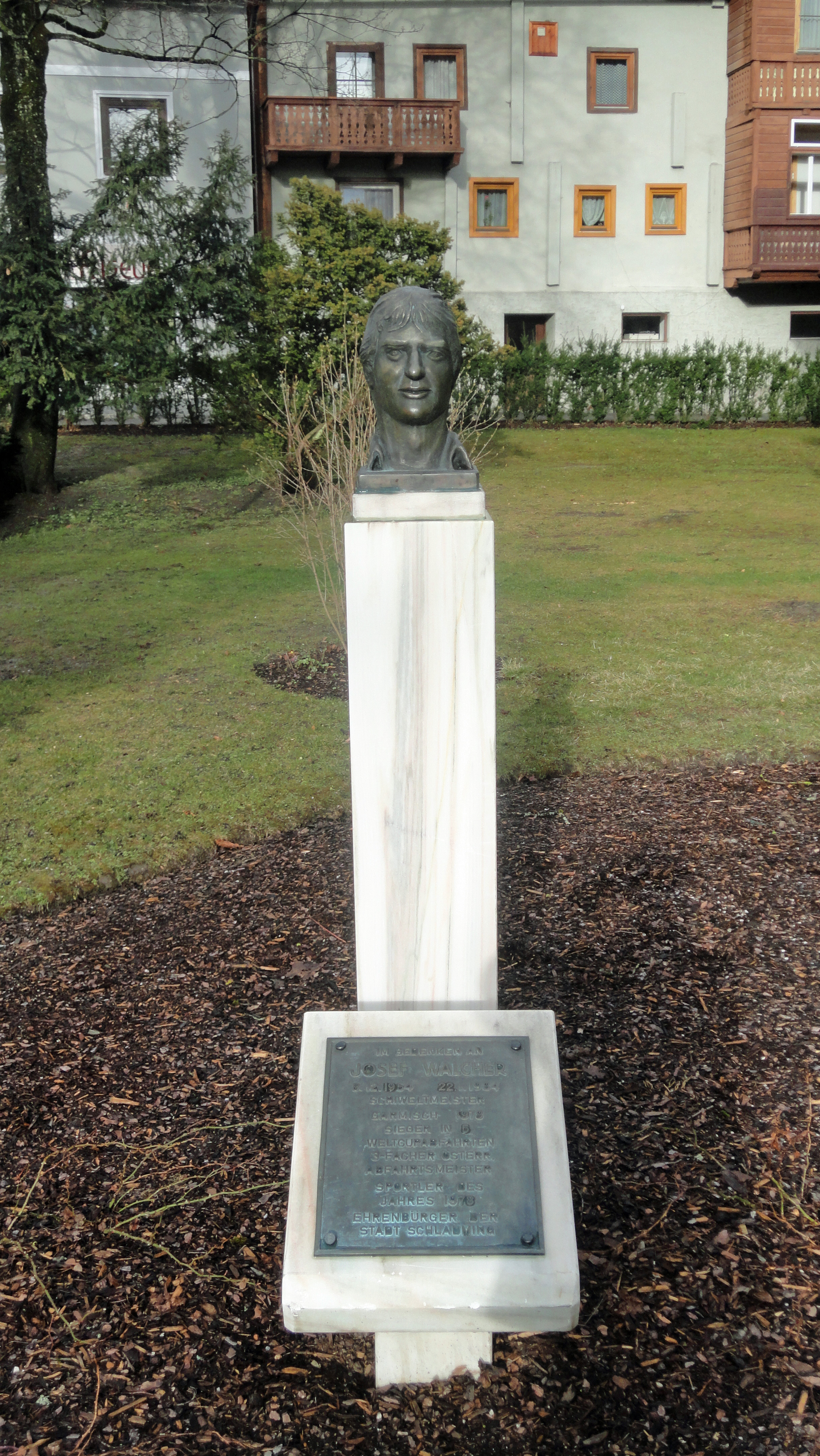 Skulptur vom verstorbenen Skirennläufer Josef Walcher aus Schladming.